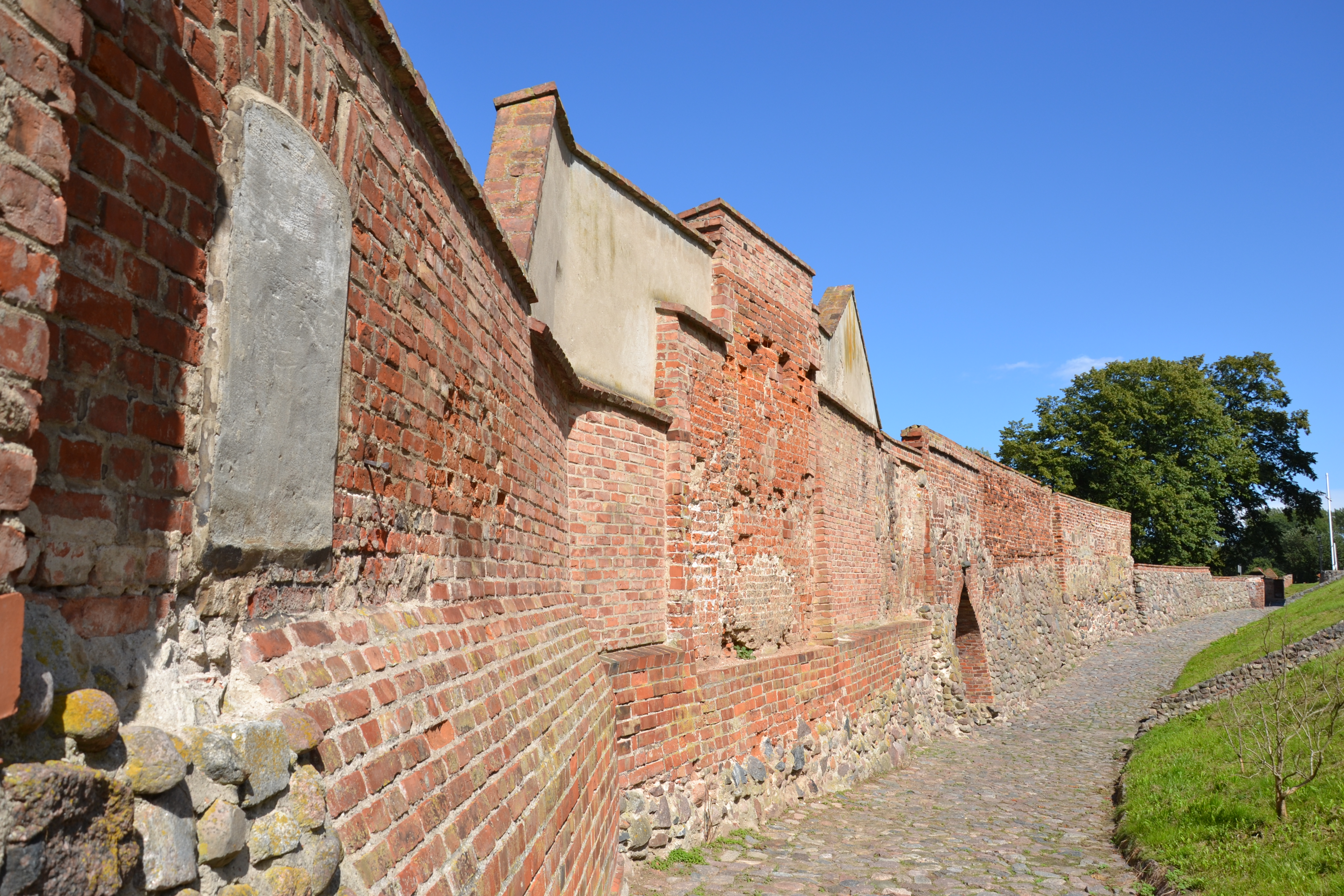 obwarowania miejskie w Kamieniu Pomorskim